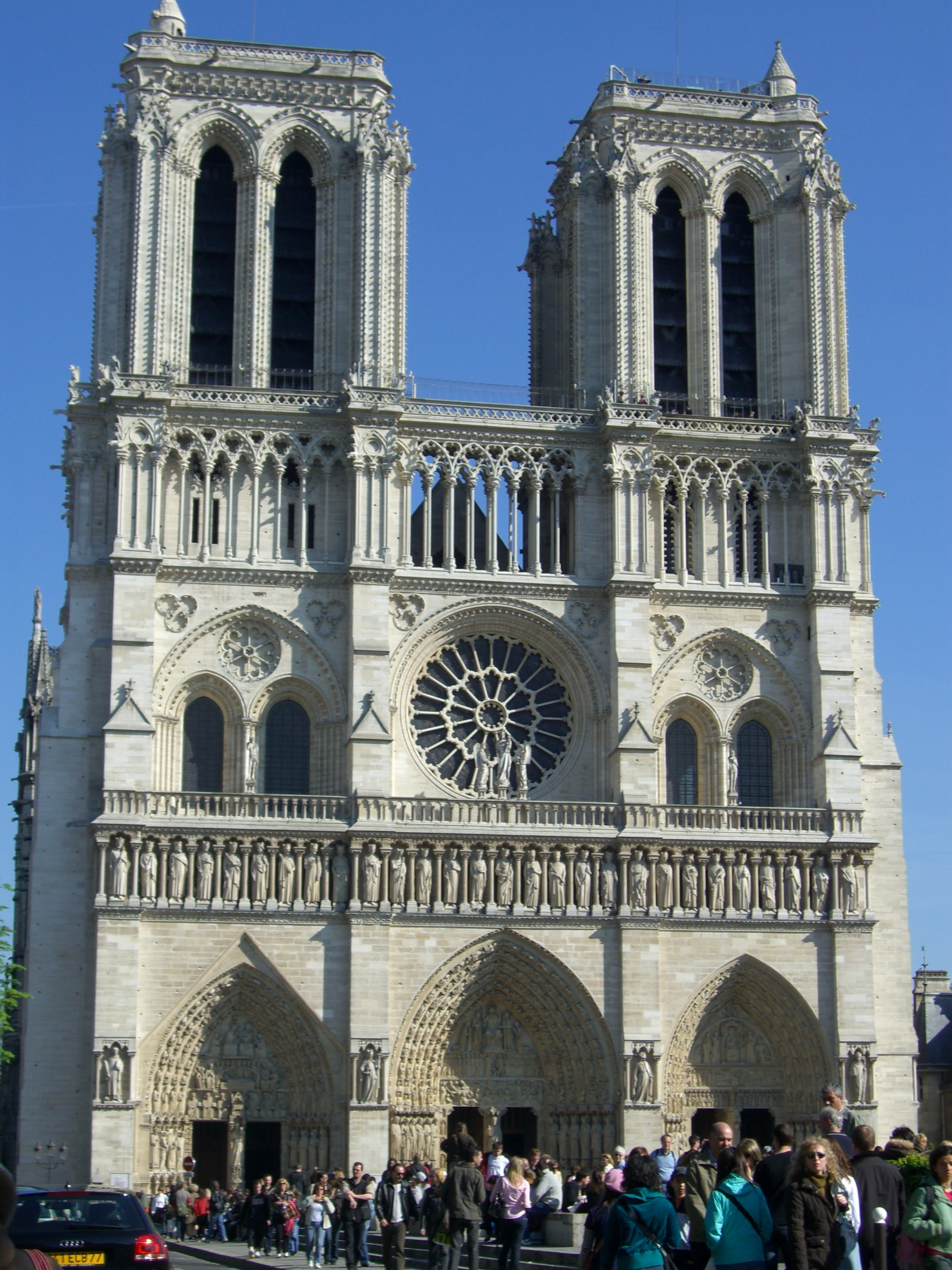 Vista da Notre-Dame de Paris (WikiEncontro da WP:PT em Paris)